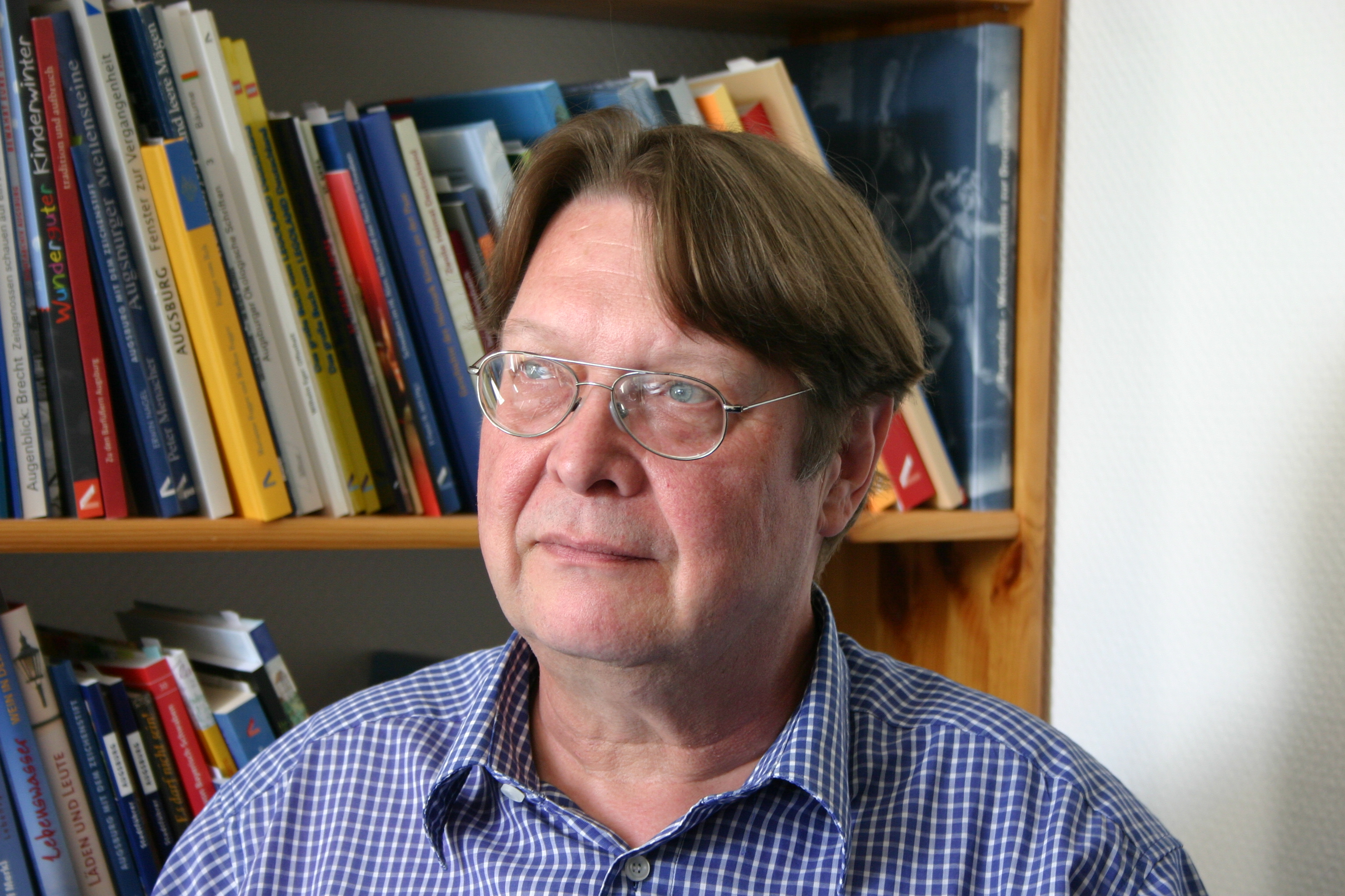 Aufnahme: Bernd Wißner